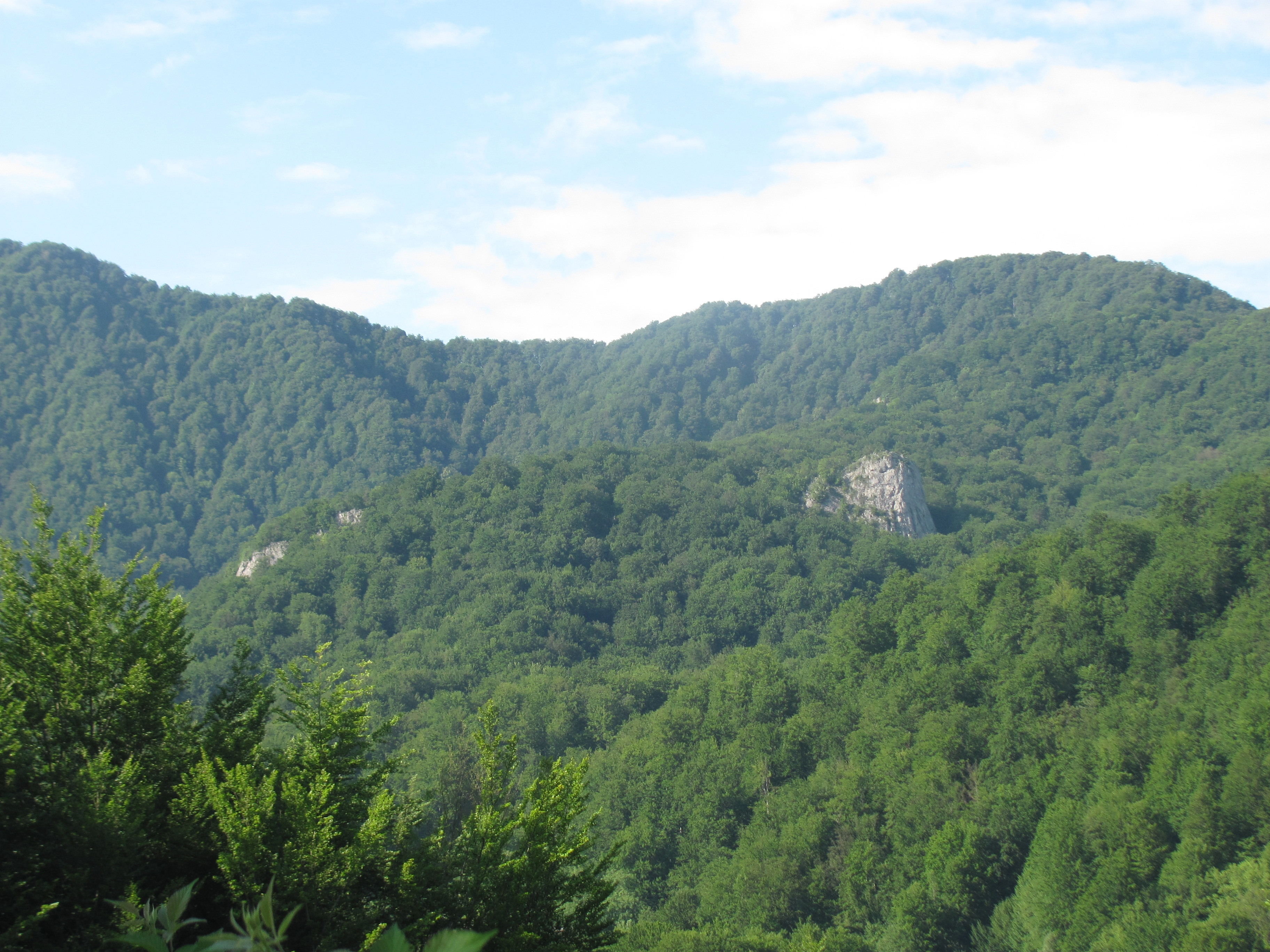 Карпатський біосферний заповідник, Рахівський, Тячівський, Хустський, Виноградівський райони